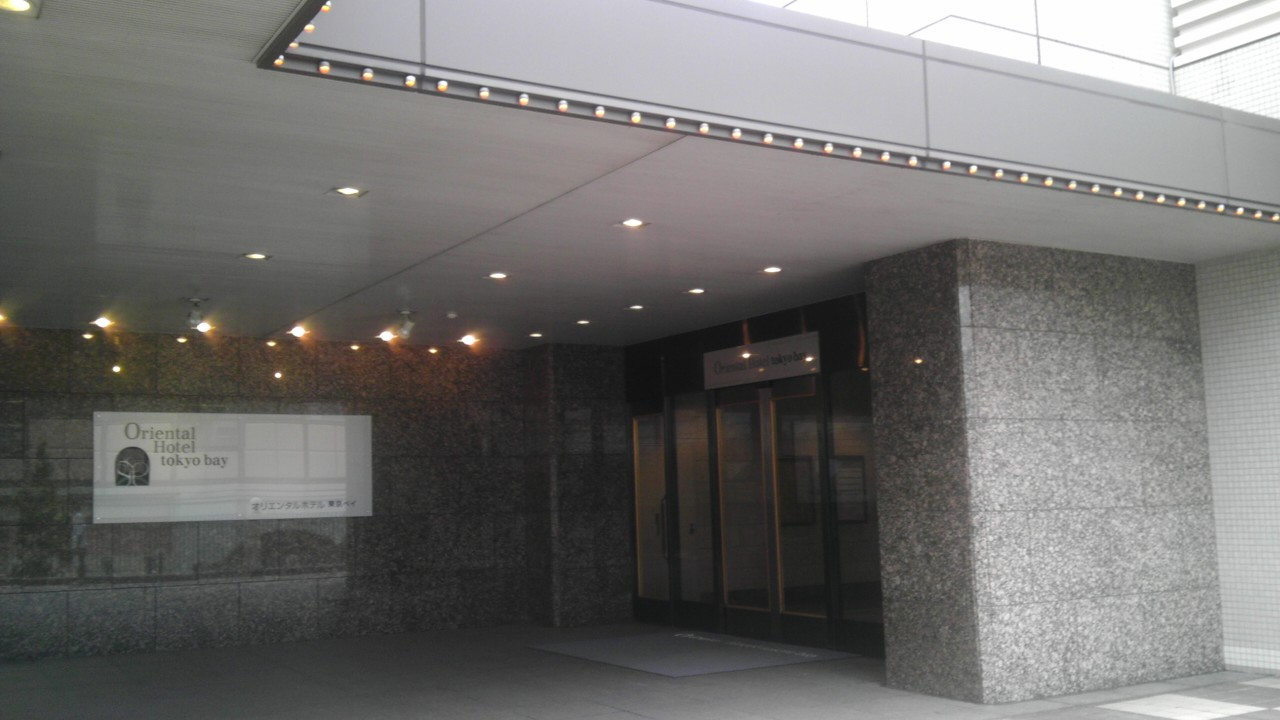 オリエンタルホテル東京ベイ 入り口